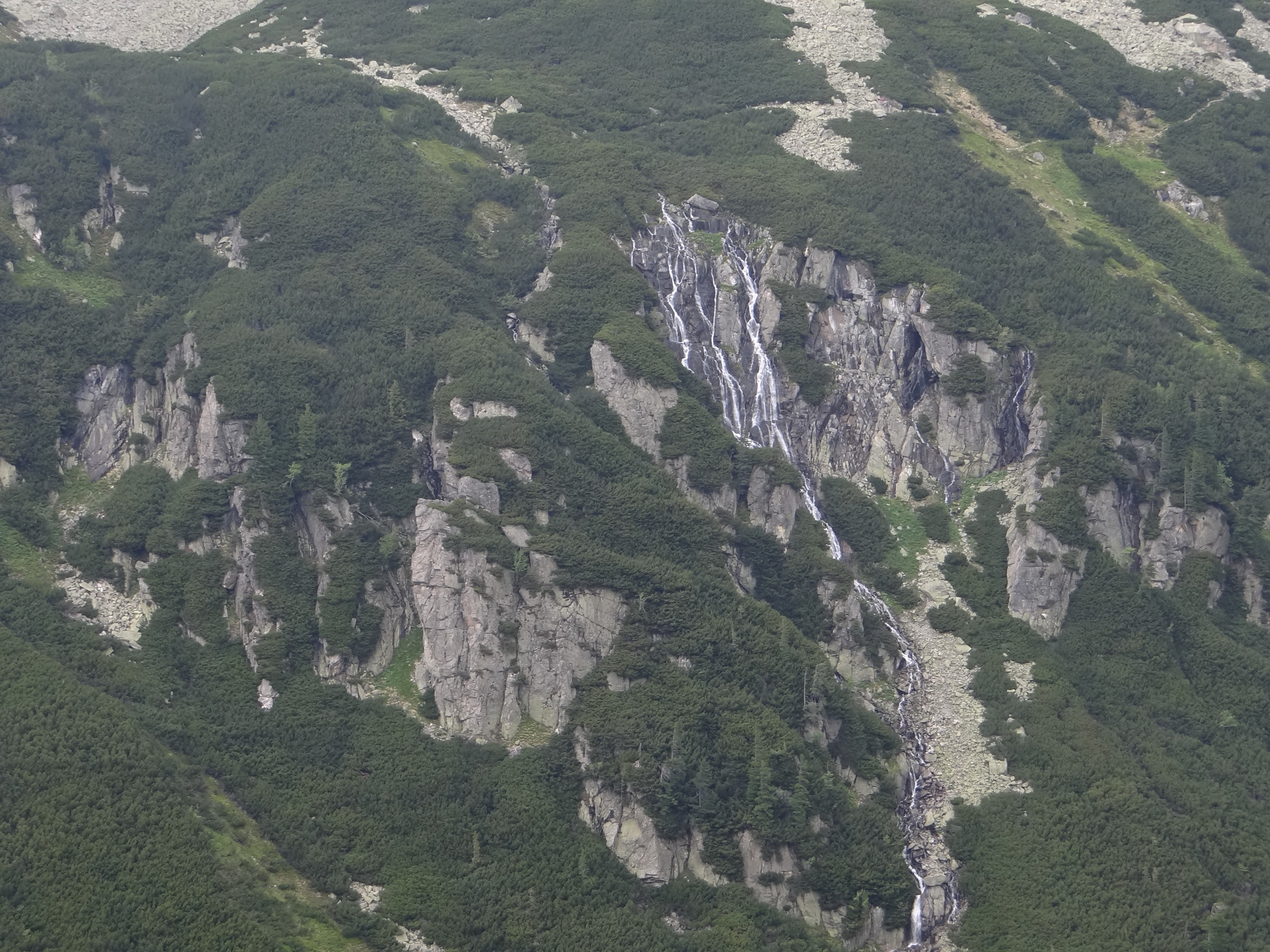 Widok spod Niżnej Kopy